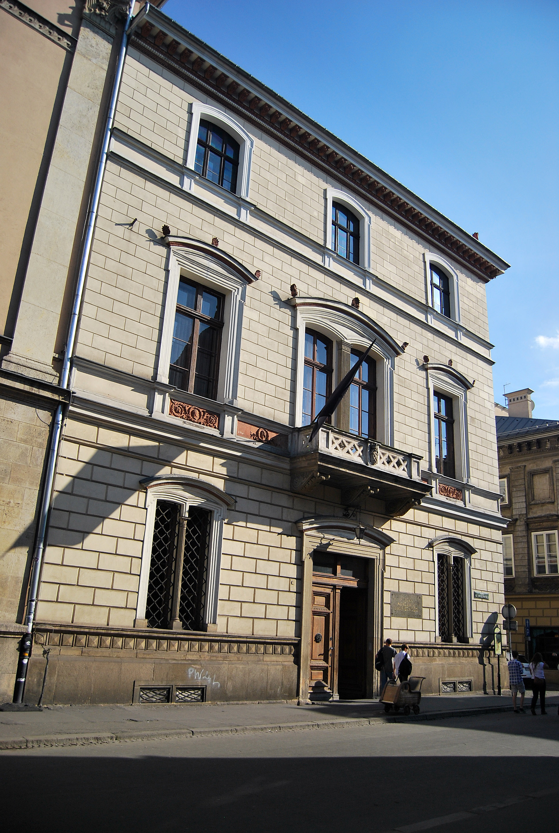 gmach Towarzystwa Naukowego przy ulicy Sławkowskiej 17 w Krakowie.